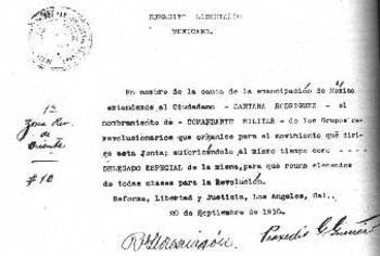 Nombramiento de la Junta Organizadora del Partido Liberal Mexicano a Santana Rodríguez como comandante militar del PLM en Veracruz. El documento está firmado por Ricardo Flores Magón y Práxedis G. Guerrero.